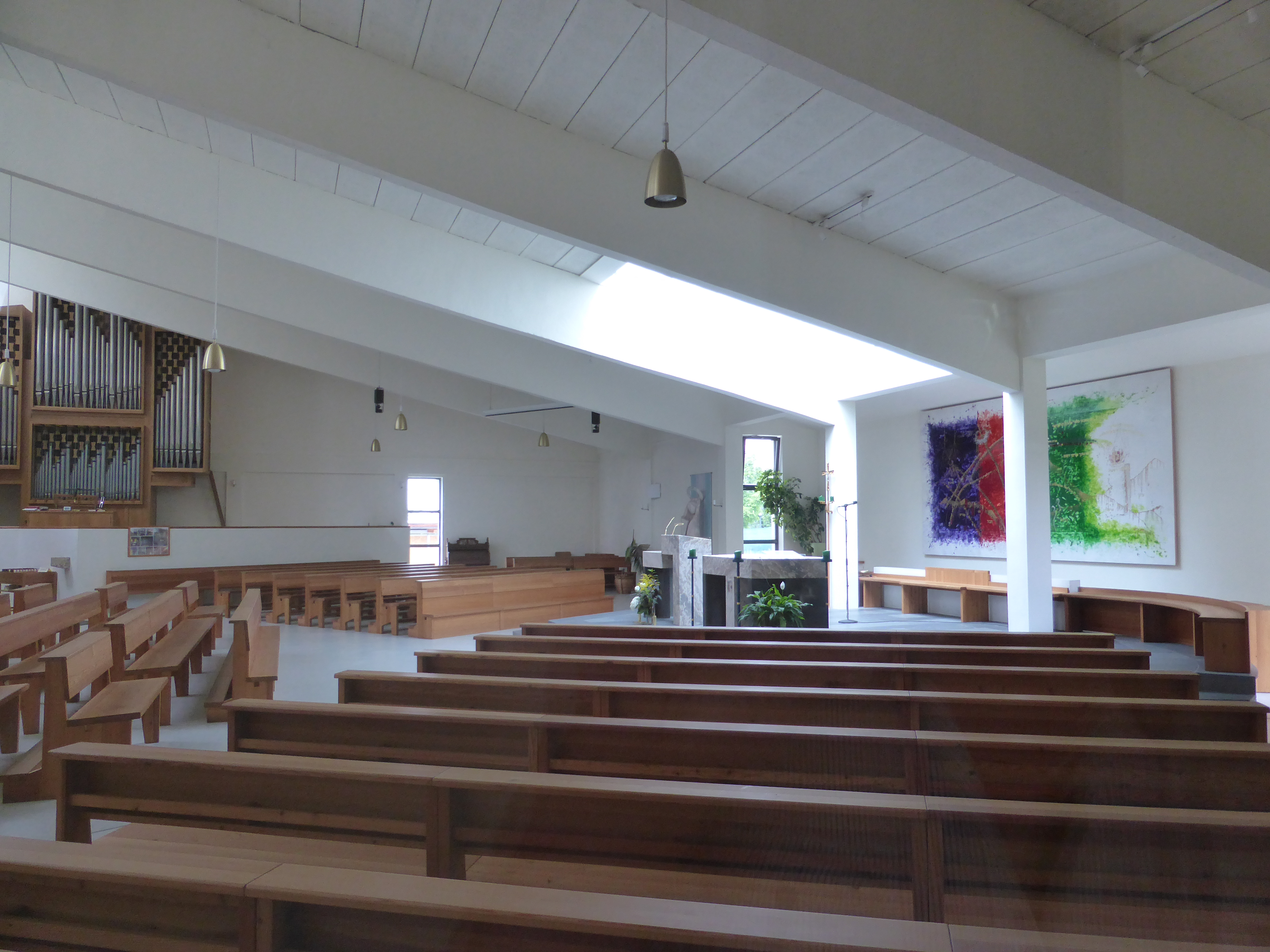 Pfarrkirche St. Severin Blick von der Kapelle in den Kirchenraum